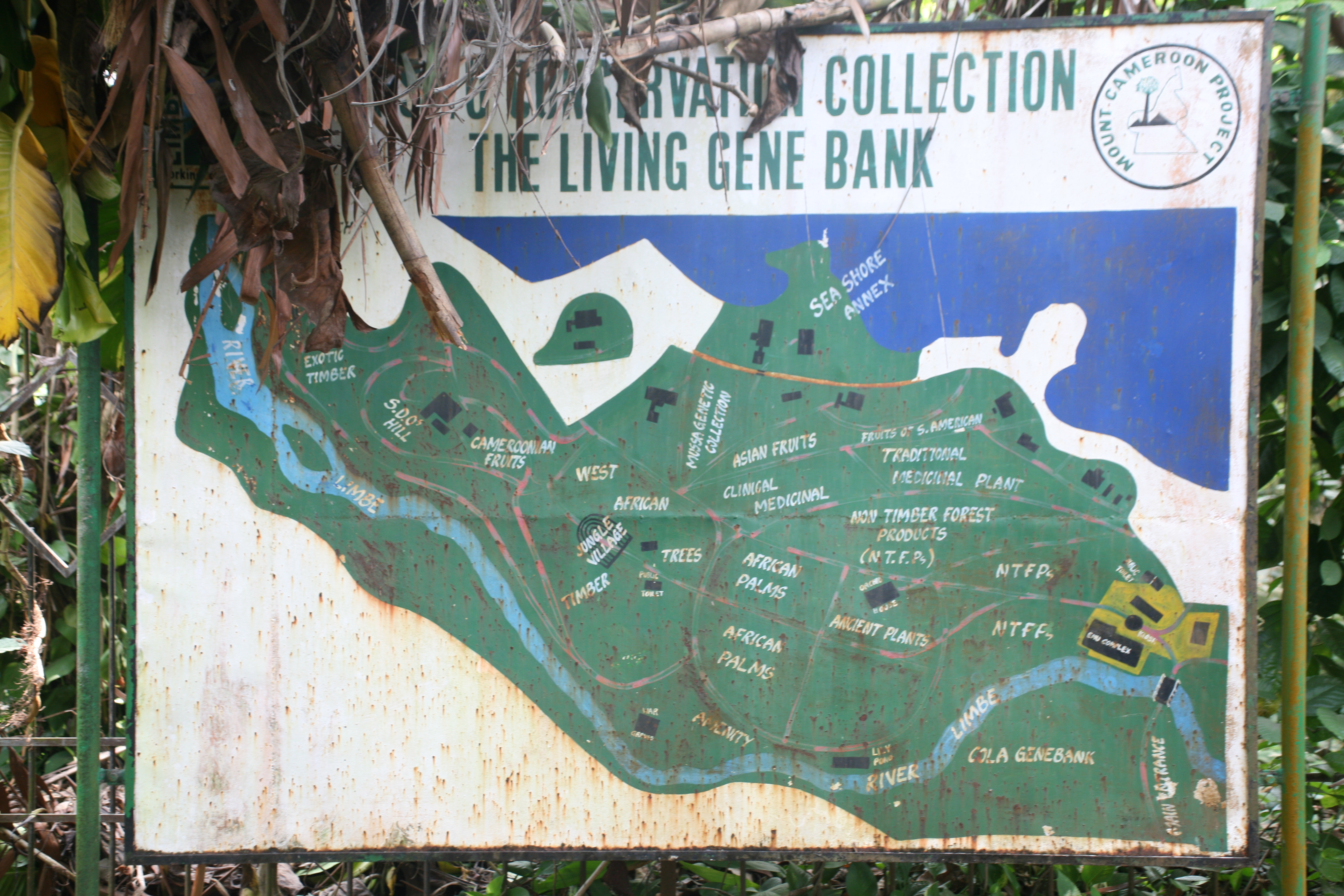 Jardin Botanique Limbé